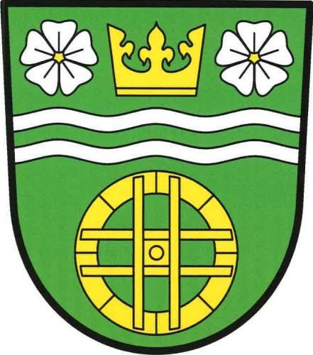 Všeradov znak